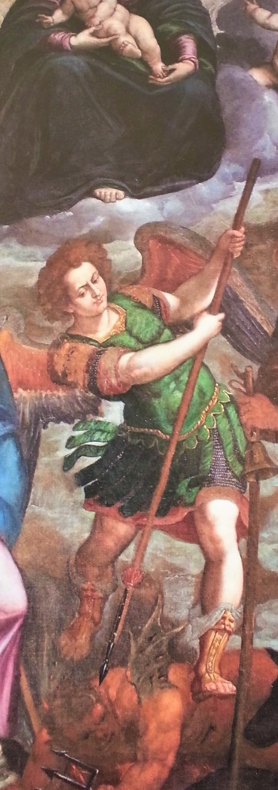 Madonna con Bambino e santi-particoalre di san Michele arcangelo